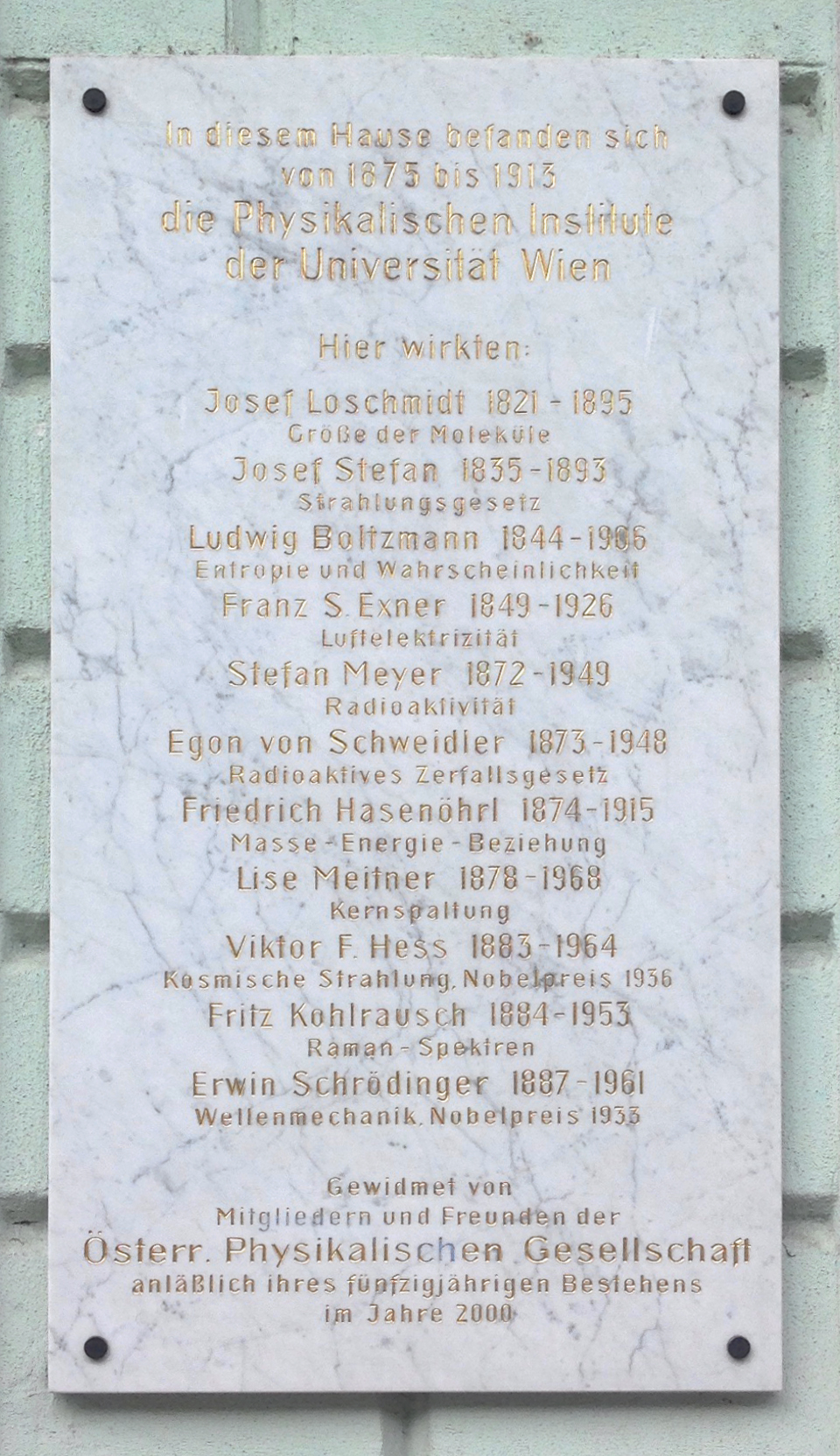 Gedenktafel am ehemaligen Physikalischen Institut der Universität Wien in der Türkenstraße 3 in Wien-Alsergrund